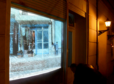 Videoinstallation Karin Albers "Suchbild" im Atelier Soldina Berlin Februar 2016 Foto Holger Hundeiker